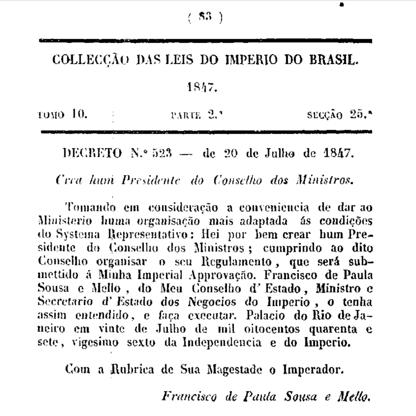 Decreto nº 523, de 20 de Julho de 1847